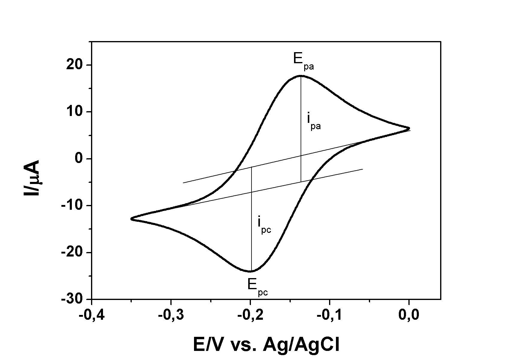 Przykładowy woltamperomgram cykliczny